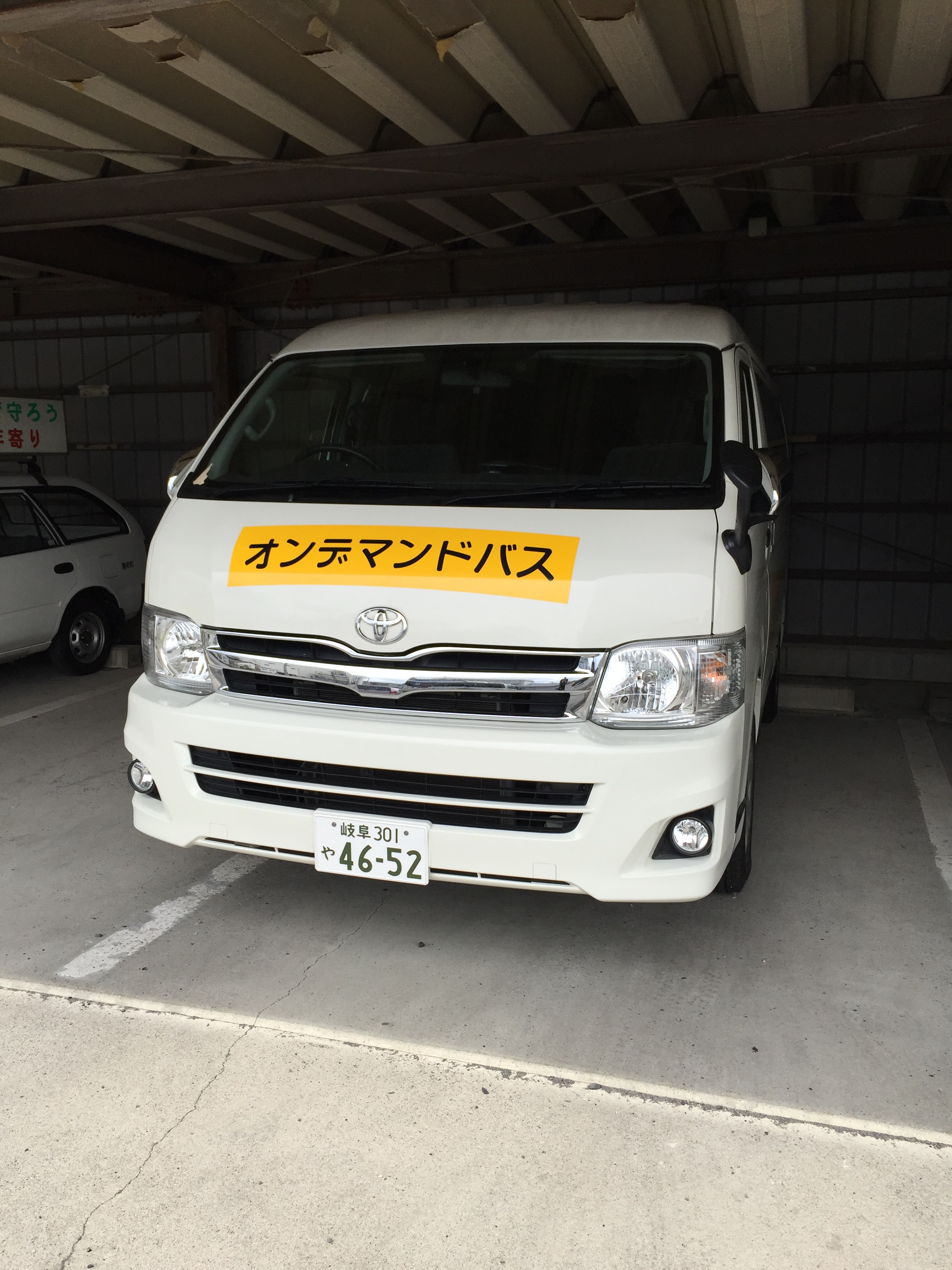 オンデマンドバスに使用されてるワゴン車。